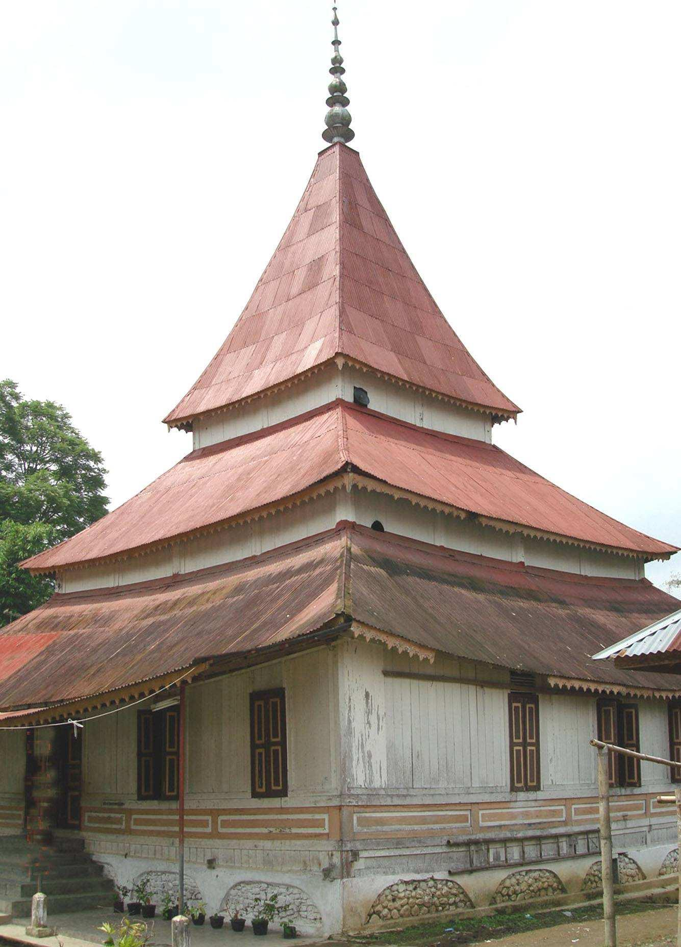 Cagar budaya Masjid Tuanku Pamansiangan